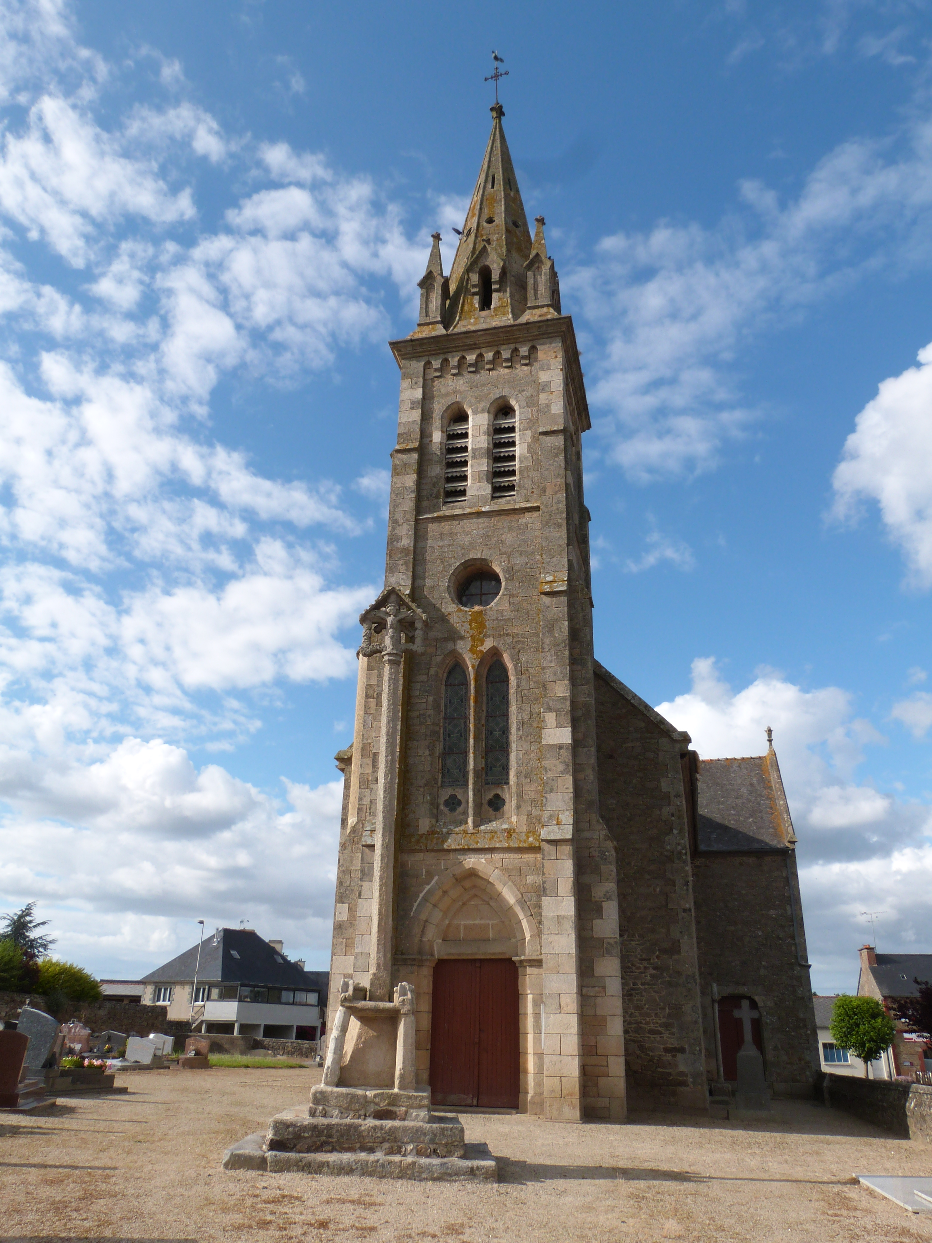 Eglise Saint-Rieul et croix